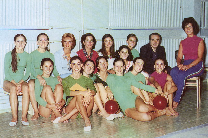 Las componentes de la selección nacional de gimnasia rítmica de España en 1975. Arriba, de izquierda a derecha: Teresa López, Mª José Rodríguez, Carmen Algora (entrenadora), Teresa de Isla (entrenadora), Marilín Such, Begoña Blasco, Mercedes Trullols (apodada Bichito), José García Aguayo (pianista) e Ivanka Tchakarova (seleccionadora nacional). Abajo, de izquierda a derecha: Carmen Lorca, Mª Jesús Alegre, Catherine Cathy Xaudaró, Rosa Hernández, Herminia Mata, Leticia Herrería y África Blesa.